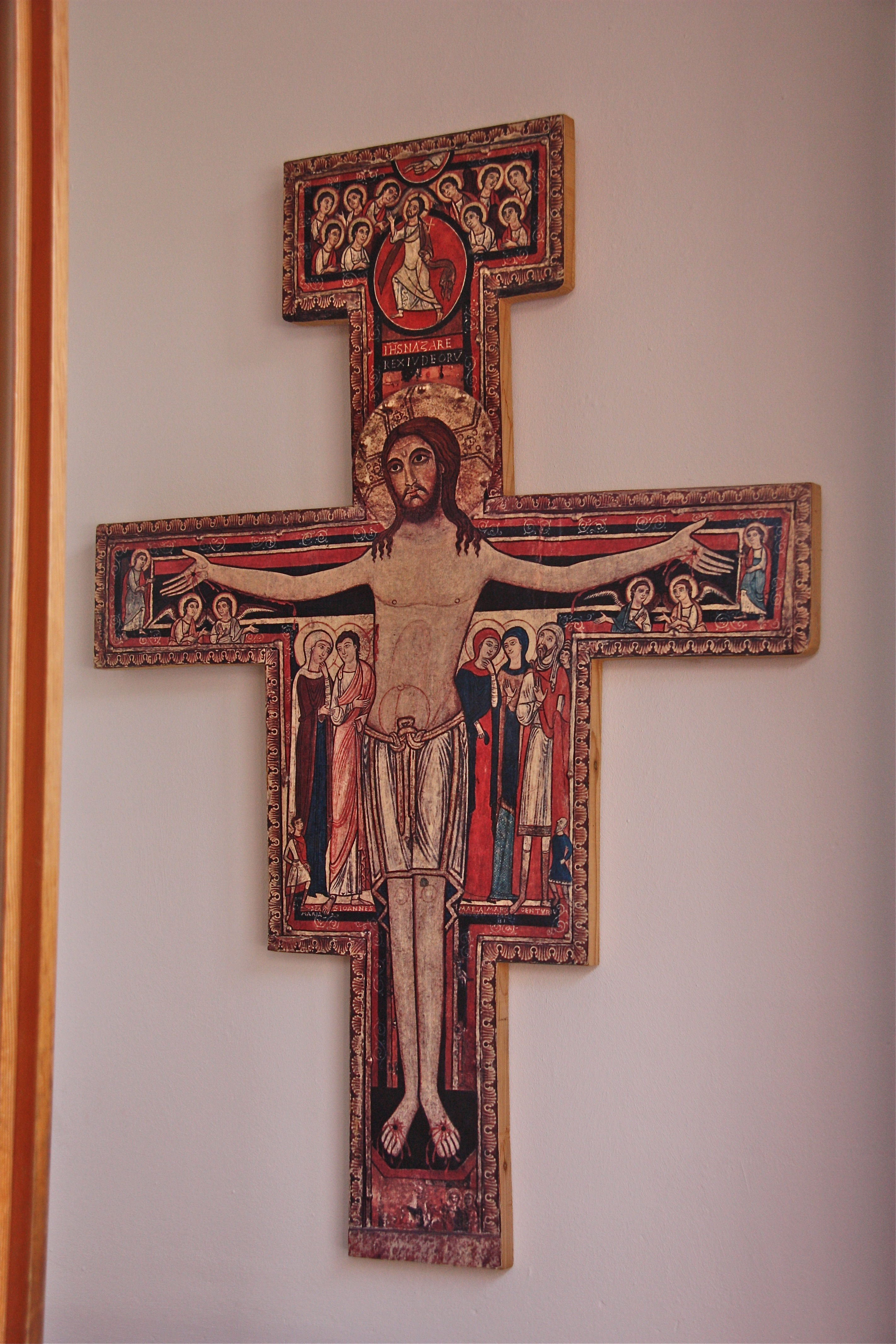 Hamburg, Neuallermöhe, Franz-von-Assisi-Kirche, Assisi-Kreuz im Eingangsbereich